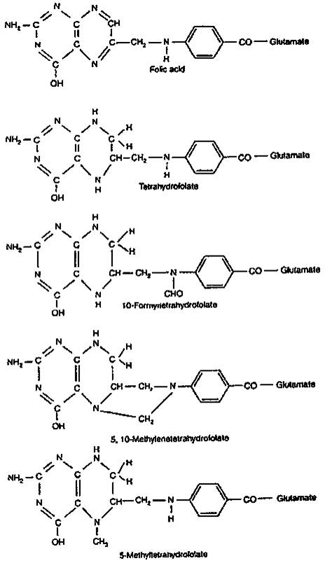 Folaadi erinevad vormid